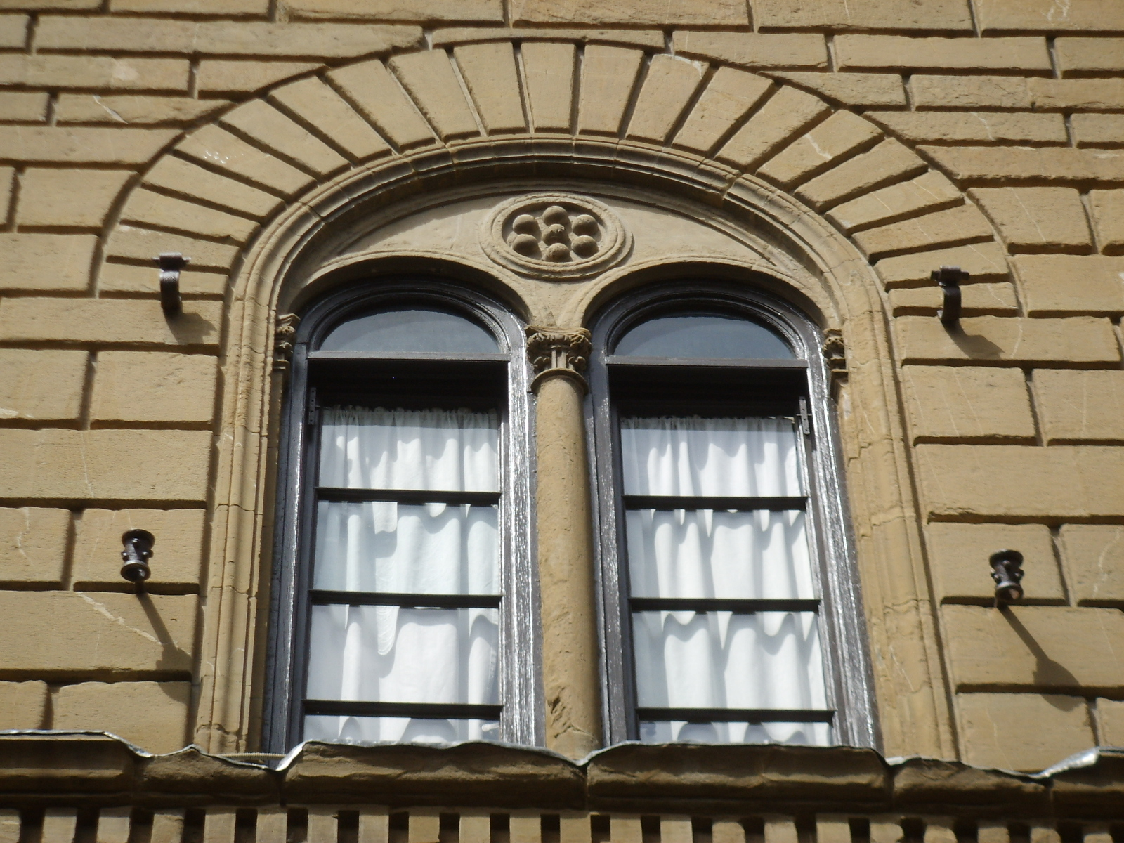 Palazzo medici riccardi, finestra